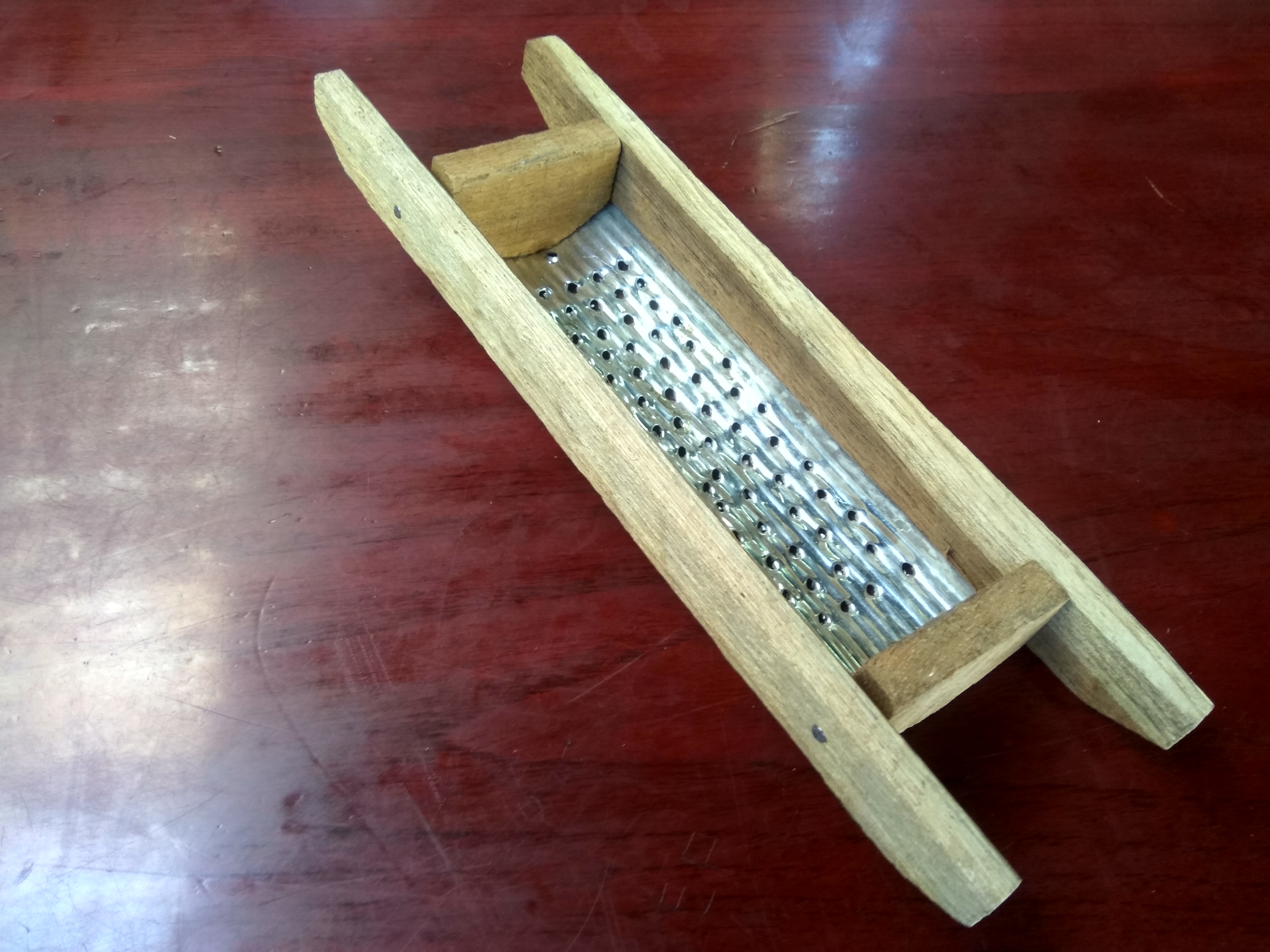 မြန်မာဘာသာ: စိန်ခလုတ်, သင်္ဘောခြစ်, မြန်မာ, မီးဖိုချောင်သုံးပစ္စည်း